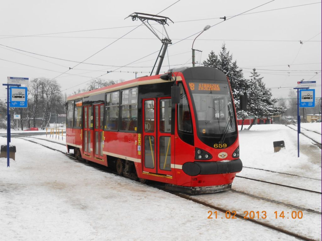 Moderus Alfa HF 11 AC #659 na linii 18 poczas postoju na przystanku końcowym Ruda Śląska Chebzie Pętla.